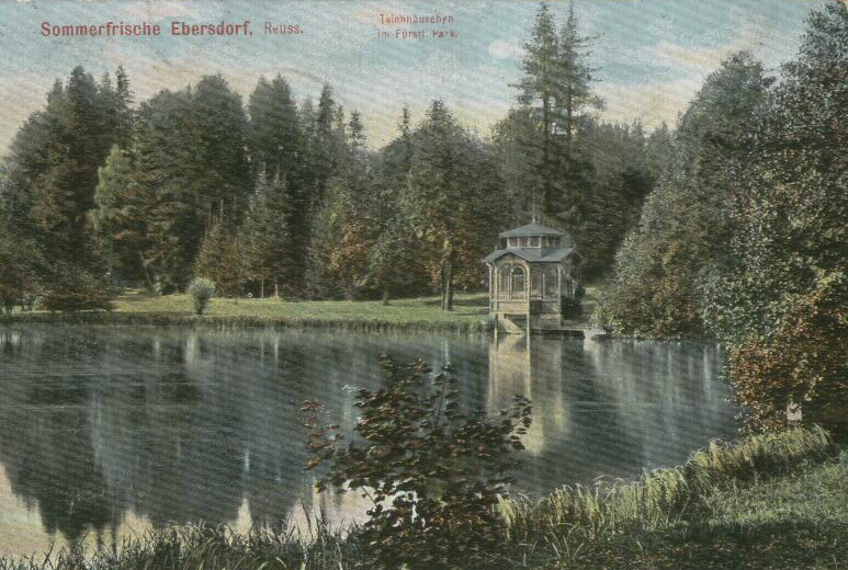 Sommerfrische Ebersdorf, Reuss - Teichhäuschen im Fürstl. Park - Ansichtskarte gestempelt 1908